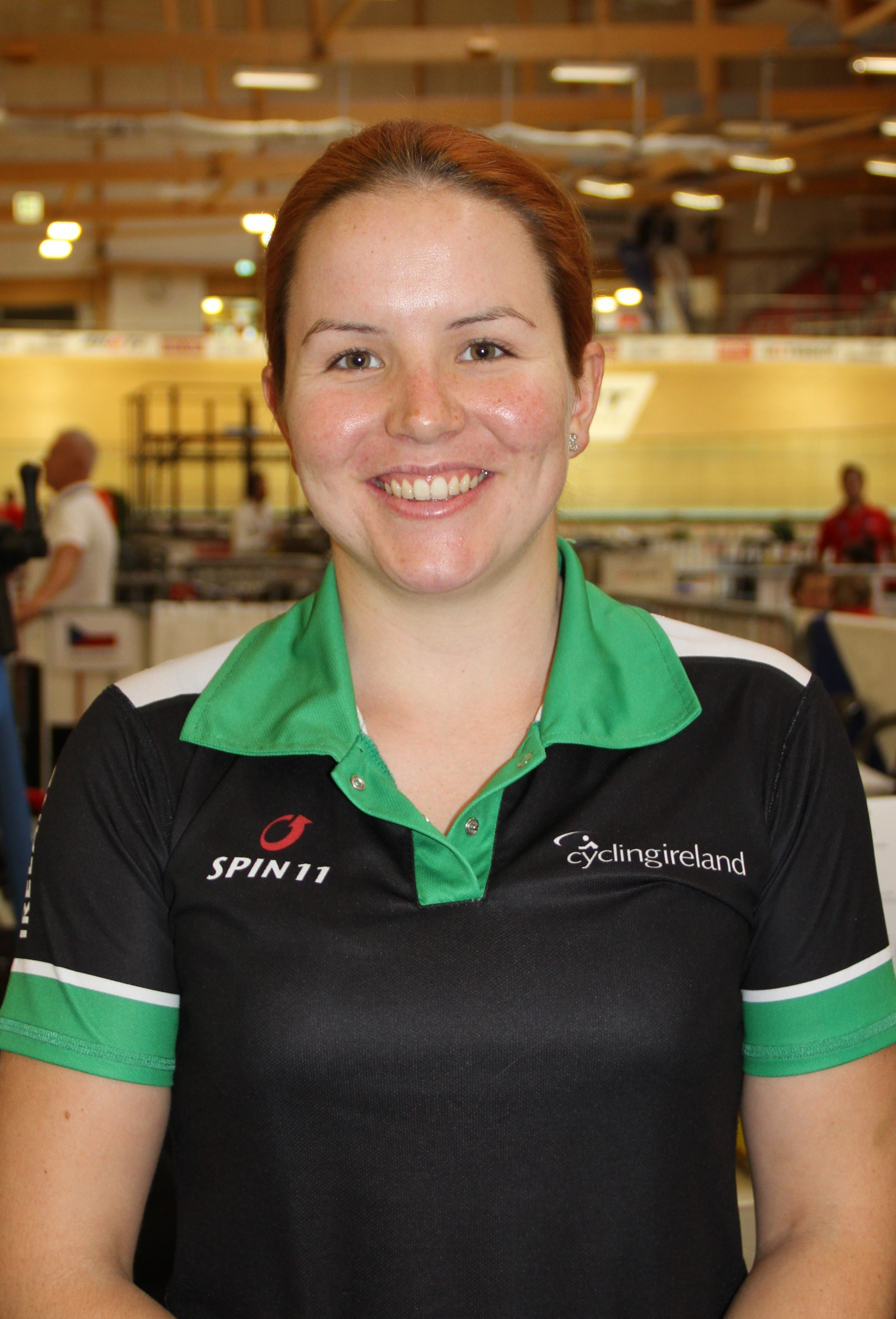 Lauren Creamer, irische Radsportlerin The making of this document was supported by the Community-Budget of Wikimedia Germany.